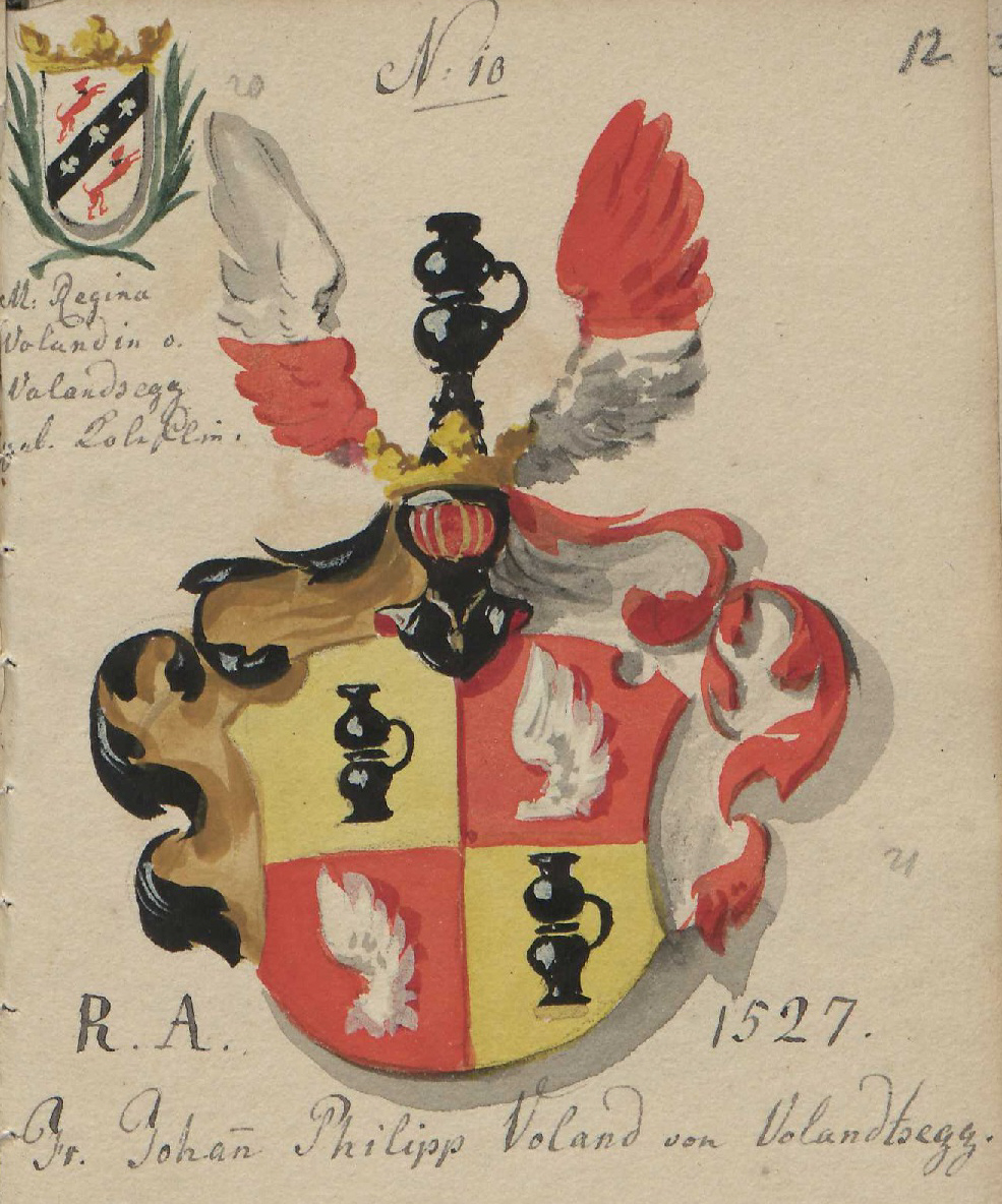 Wappenbuch der adeligen Gesellschaft zu Ravensburg. UB Augsburg – Oettingen-Wallersteinsche Bibliothek Cod.I.7.8.2, fol. 12r Johann Philipp Voland von Volandtsegg (Volland zu Vollandsegg) Regina Volandin von Volandsegg, geb. Kolefflin (Kolleffel)